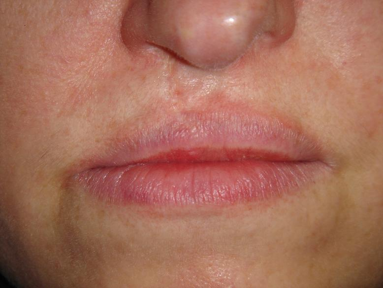 Een klant van mij, ook te zien op mijn website, met haar goedvinden! dit is de foto voor de behandeling.